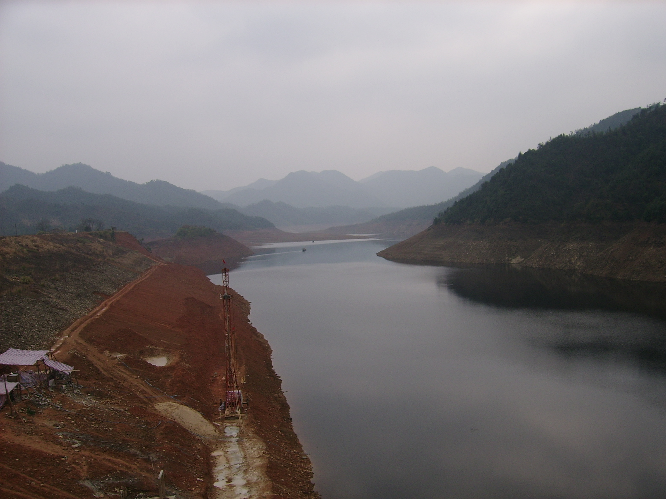 我的家乡-岳阳—岳坊水库